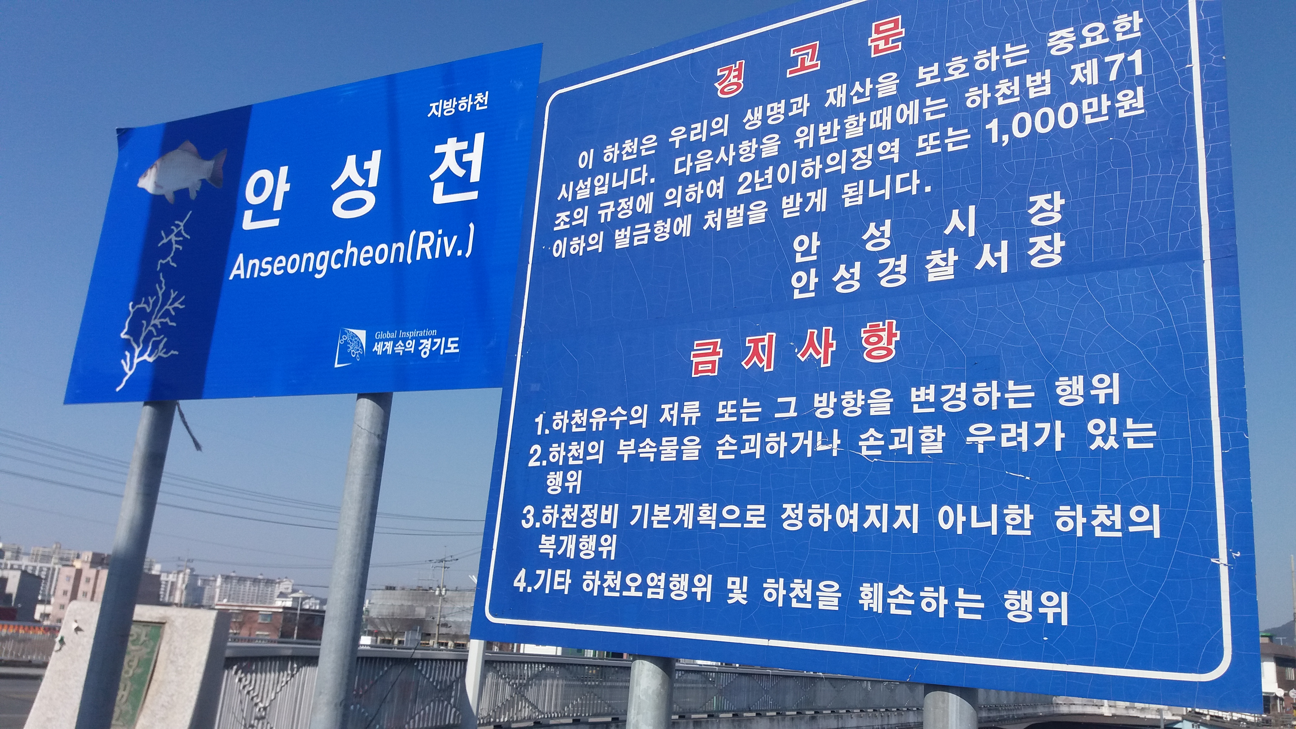 안성천 안내판